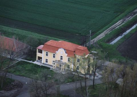 Bíró Castle, Örményes, Hungary, aerialphotography